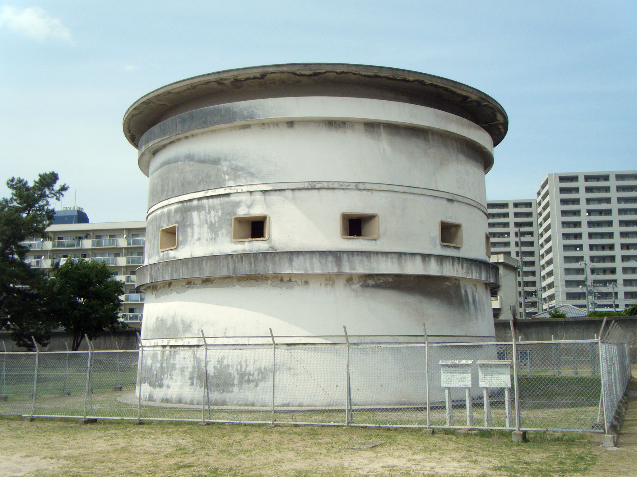 西宮砲台 全景